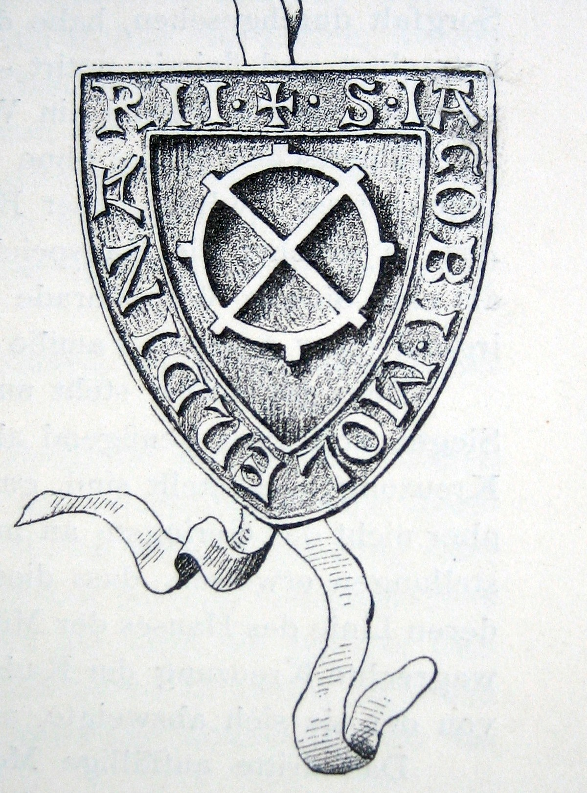 Siegel von Jakob Mülner, 12. Dezember 1240